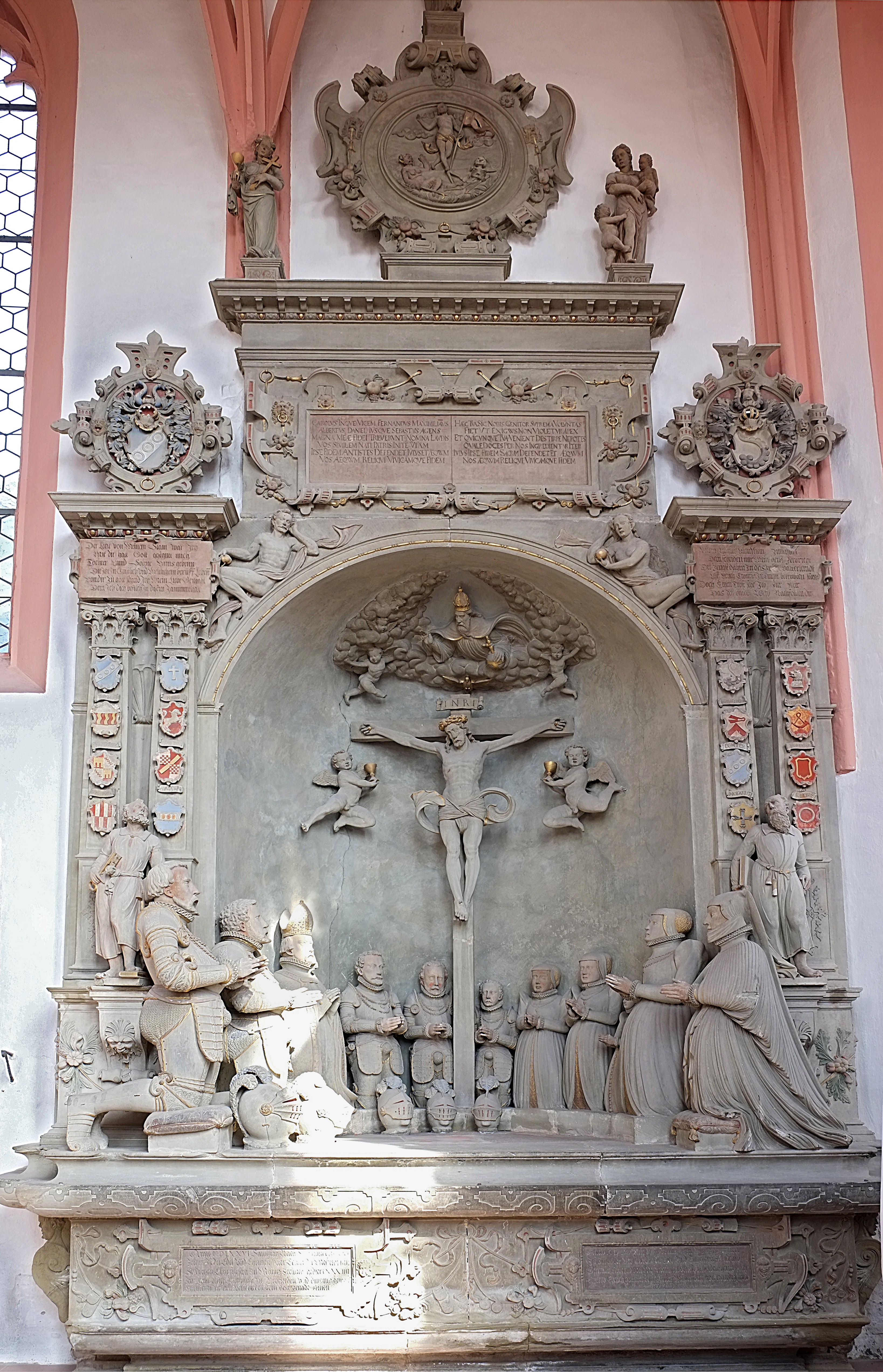 Epitaph für Peter III. Echter (1520-1576) und Gertraud von Adolzheim (1525–1583) in der Wallfahrtskirche in Hessenthal, einem Ortsteil von Mespelbrunn im Landkreis Aschaffenburg (Bayern, Deutschland)